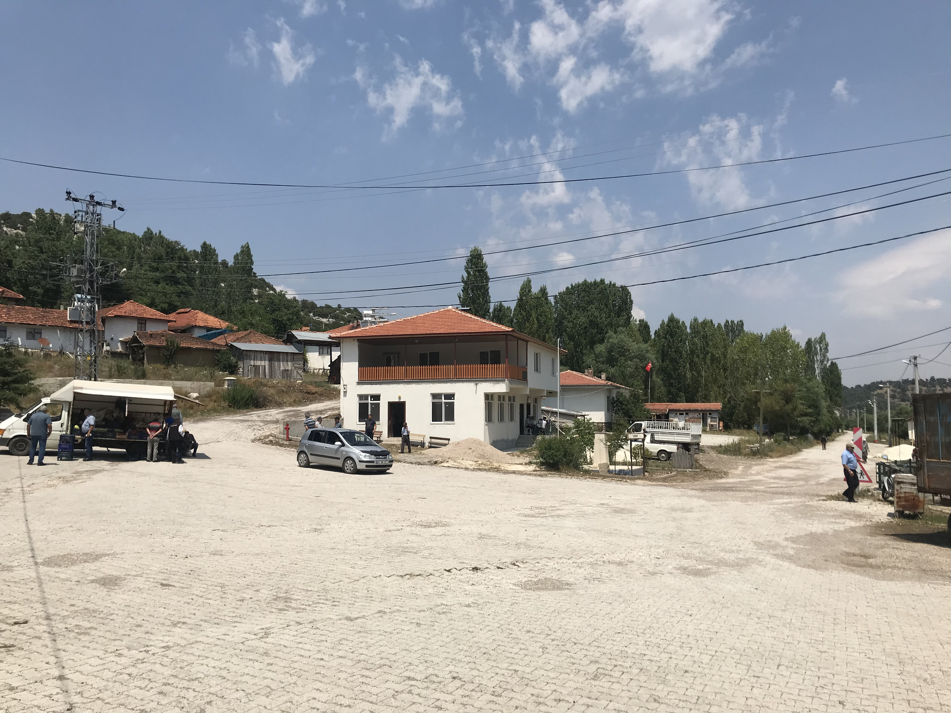 Centre-ville du village de Başmakçı prise le 2 août 2019 après la prière islamique du vendredi.